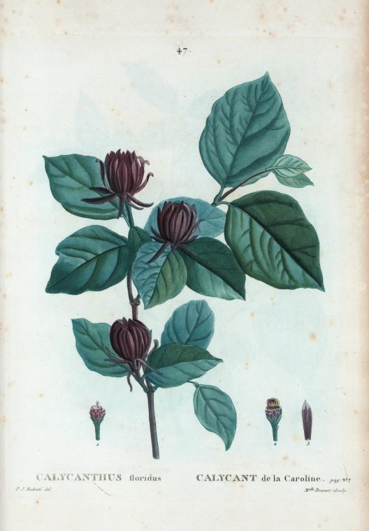 Calycanthus floridus = Calycant de la Caroline.